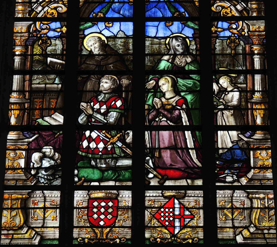 Vitraux Antoine II de Lalaing, comte d'Hoogstraten- Éleonore de Montmorency